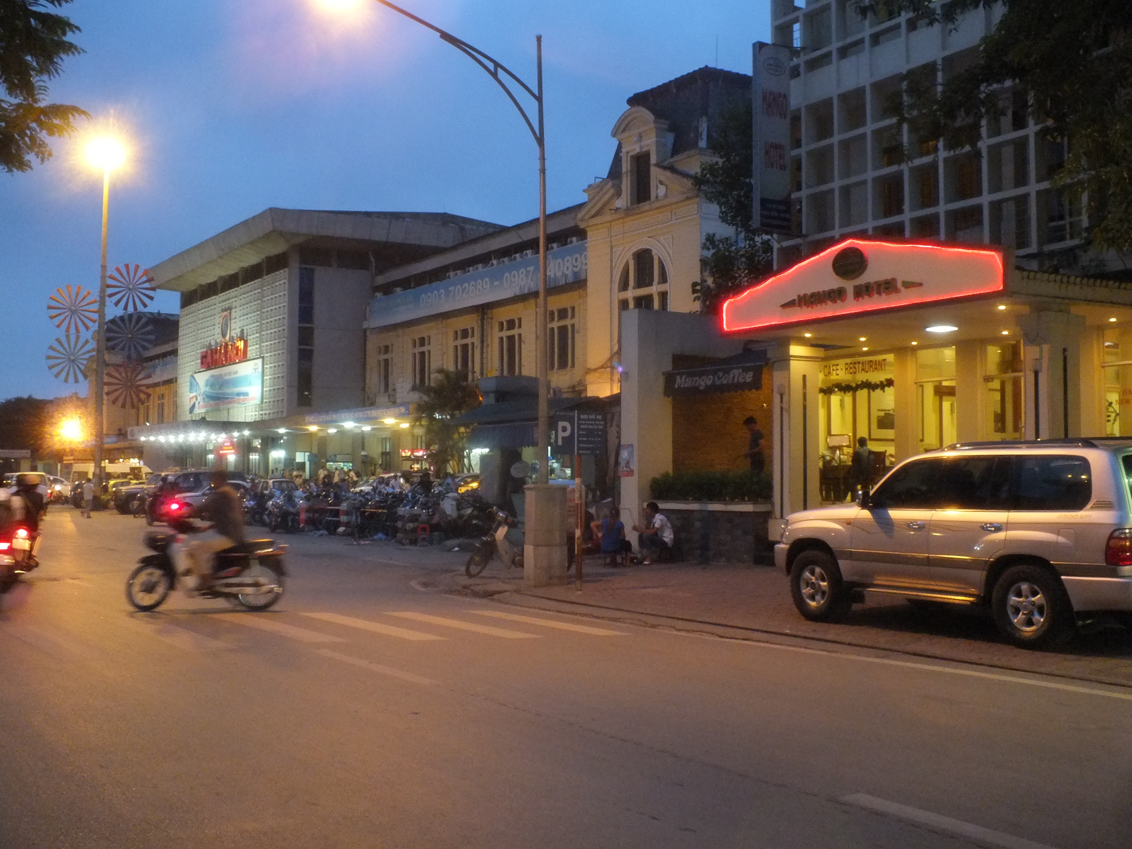 Ga Ha Noi Hanoi Station